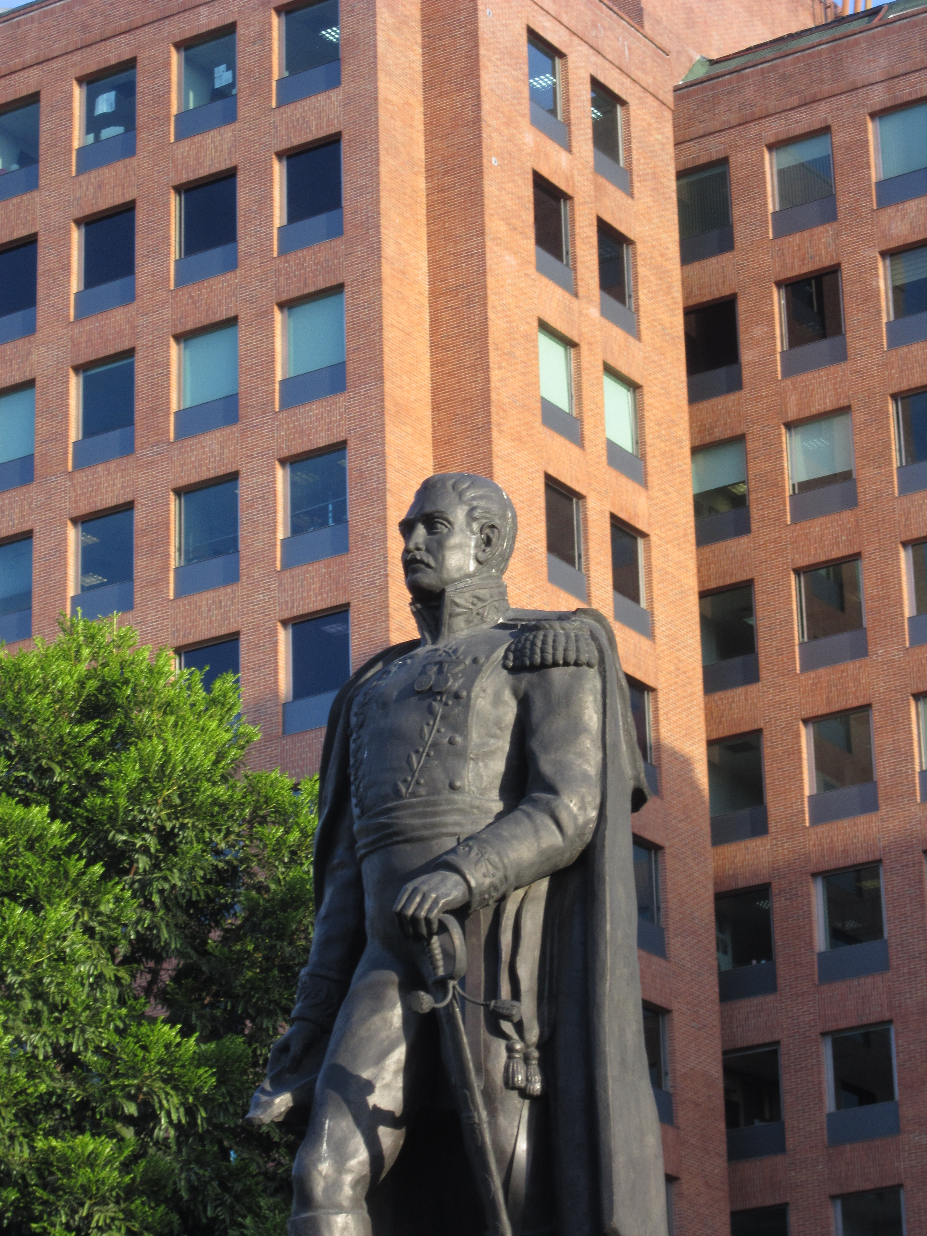 Monumento en la Autopista Norte con calle 100 en el barrio Chicó Norte de Bogotá. Escultura del prócer José Antonio Anzoátegui.